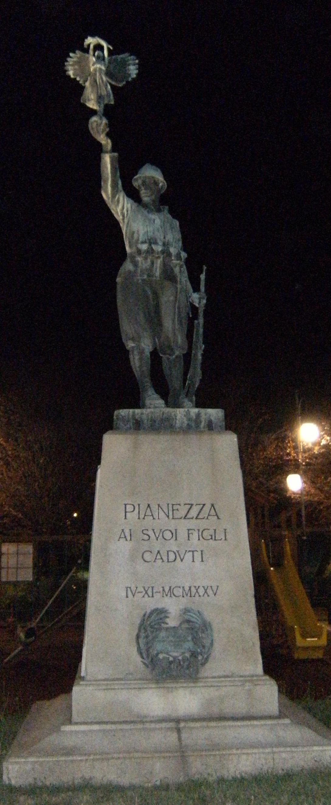 Image of Pianezza